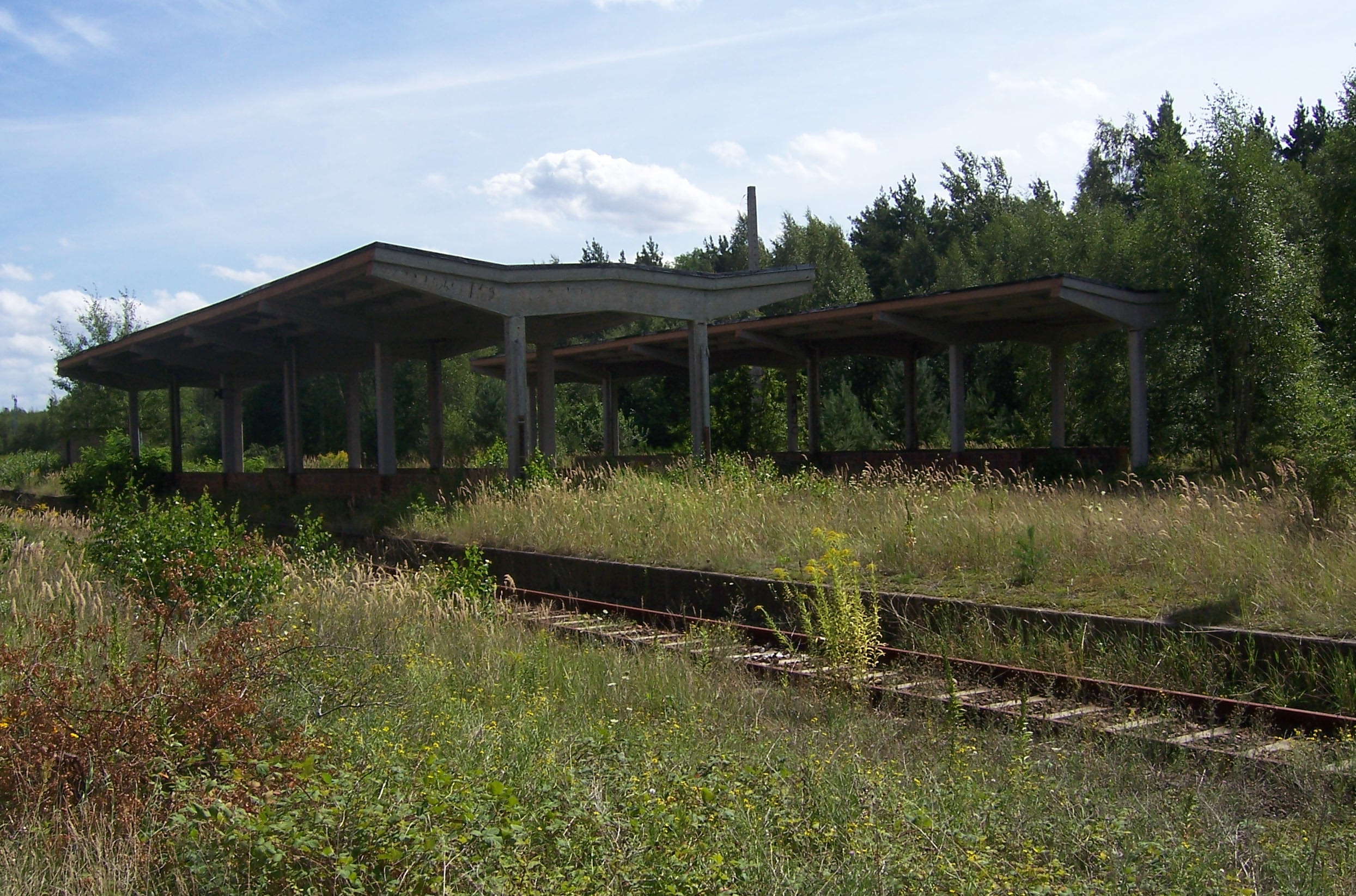 Bahnsteige des stillgelegten Bahnhofs des Kraftwerkes Schwarze Pumpe